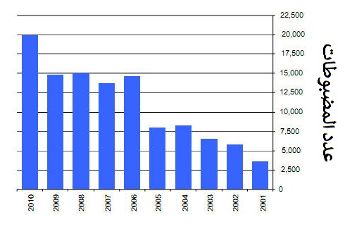 النُمُو في مضبوطات السلع المُقلَّدة من قبل الولايات المُتحدة.